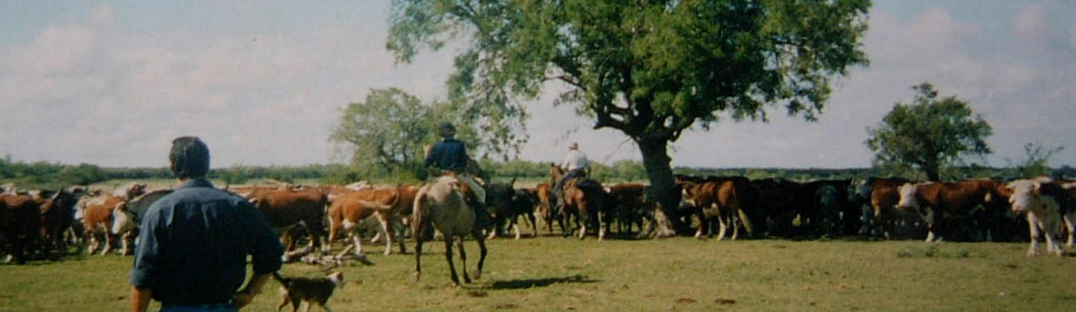 cattle driving, juntando ganado, Departamento Florida Uruguay